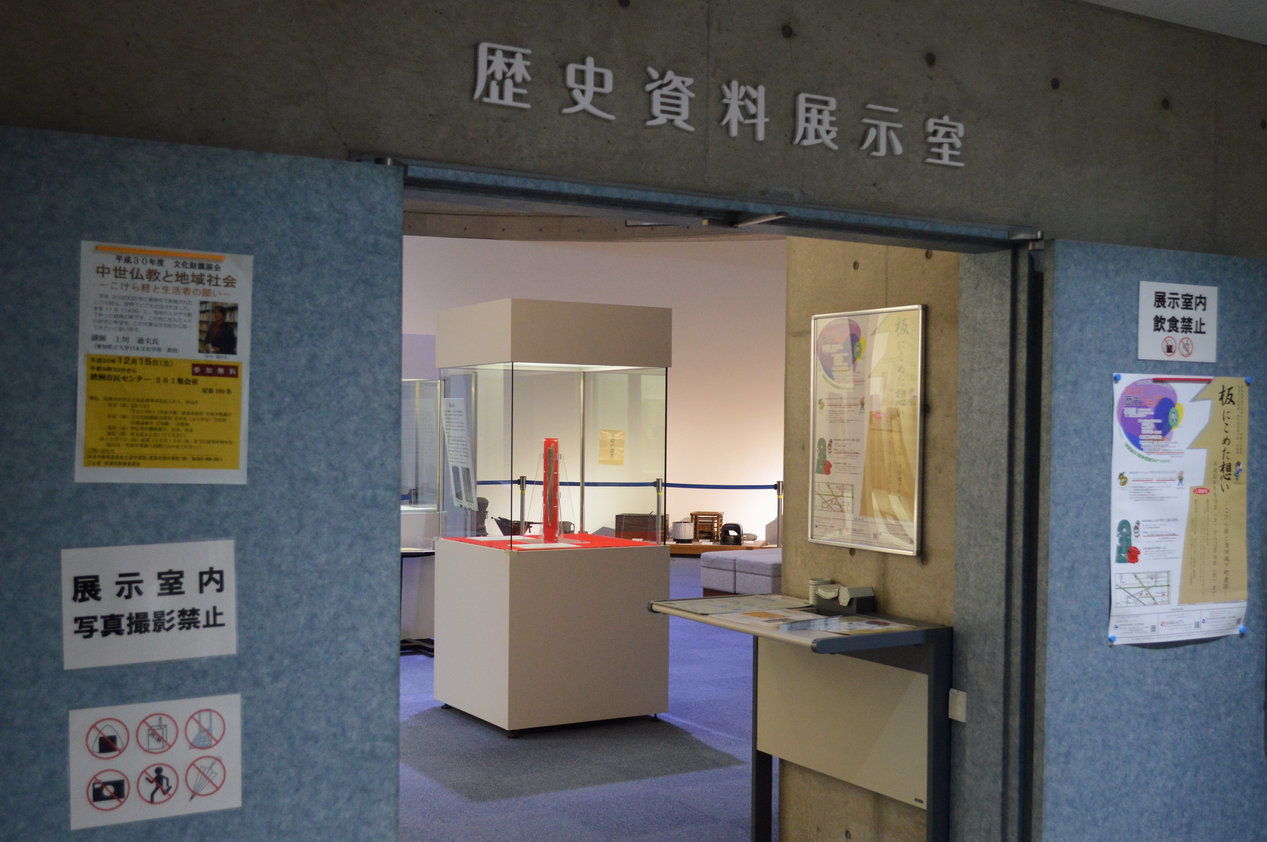 愛知県清須市の清須市立図書館。歴史資料展示室。